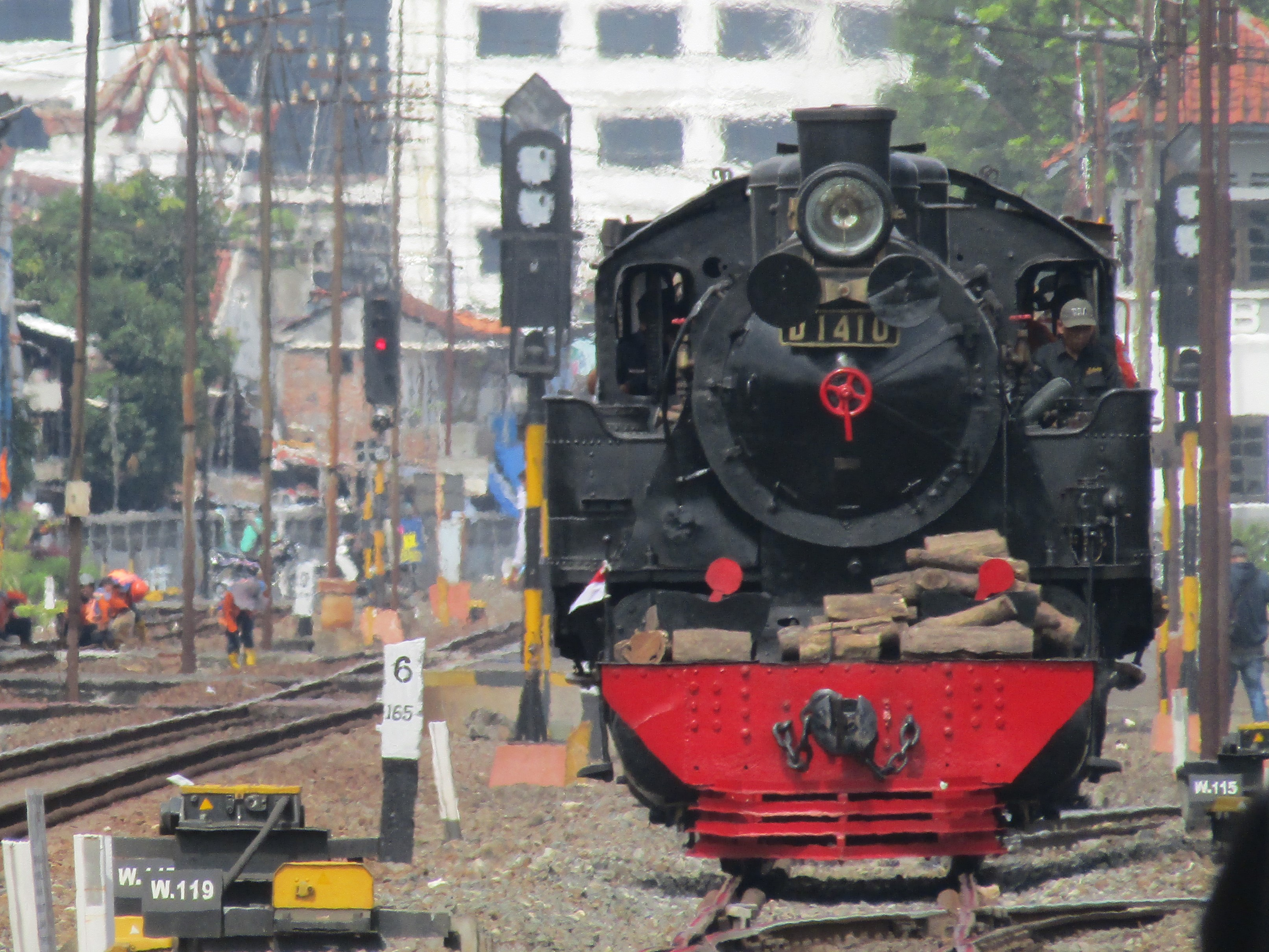 Pemberangkatan lokomotif uap D1410 dan TMC dari Stasiun Lempuyangan ke Stasiun Purwosari, Solo